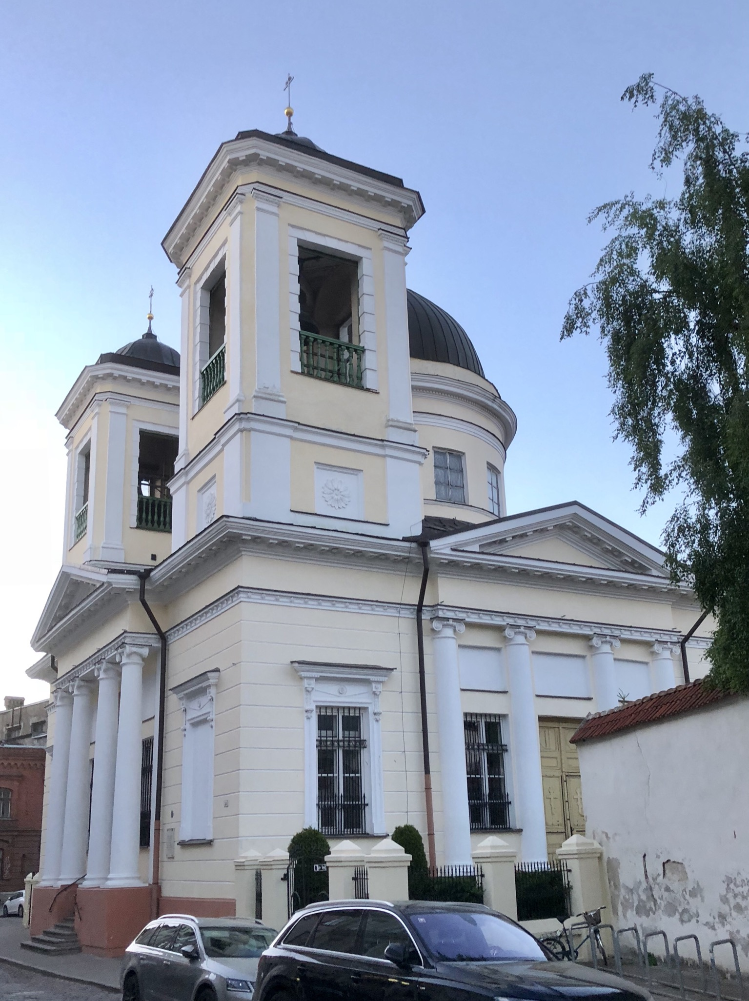 Sankt Nikolaus Kirche